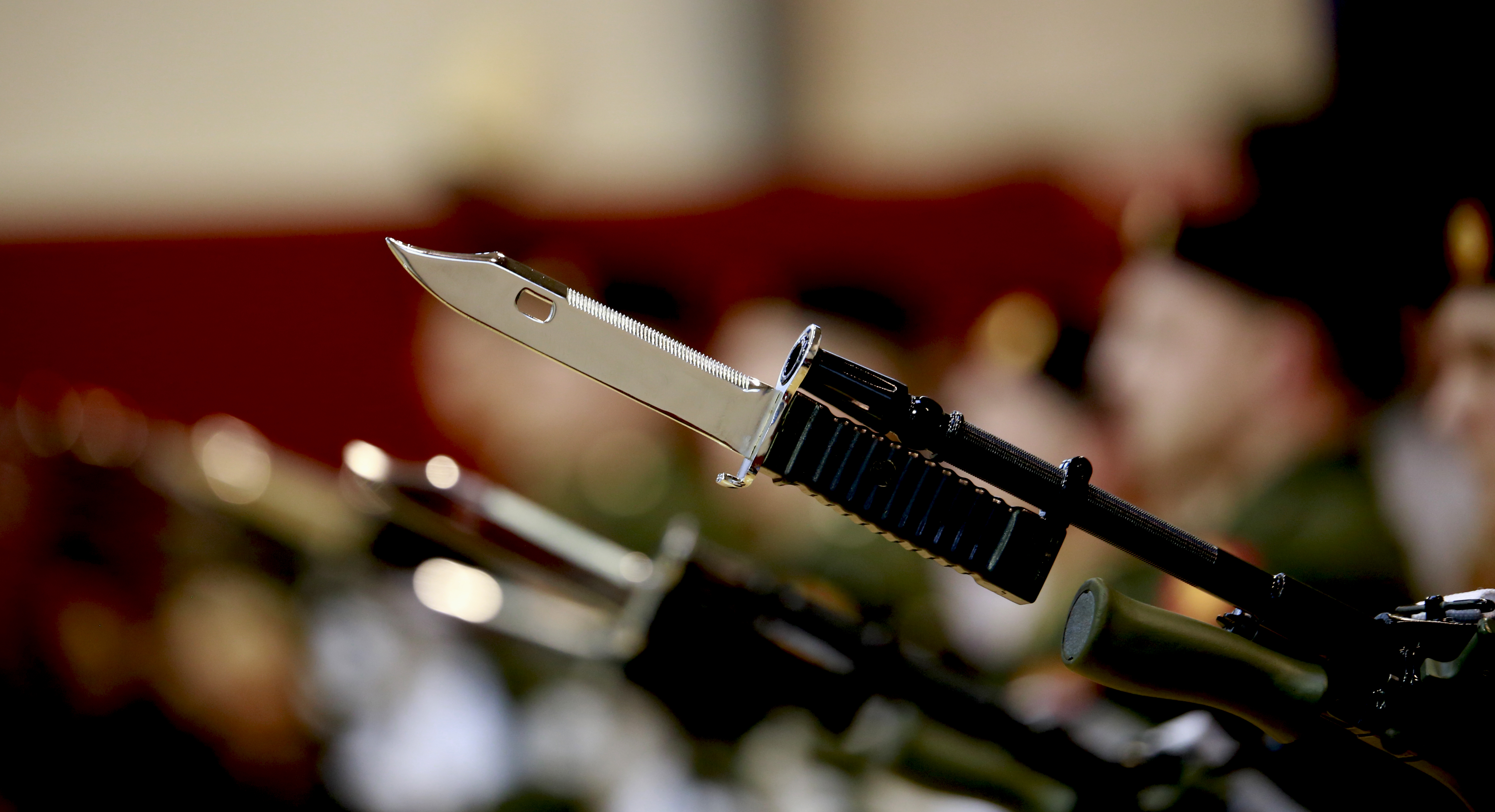 1st Mech Rec Pln Passing Out